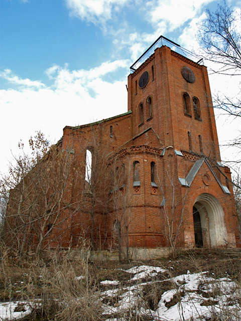 Ruinierte evangelische Jesuskirche in Sorkino (ehem. Zürich), Russland.